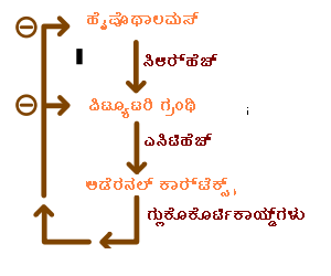 ಕನ್ನಡ: ಸಮಸ್ತಂಭನ ನೆಗೆಟಿವ್ ಫೀಡ್‌ಬ್ಯಾಕ್